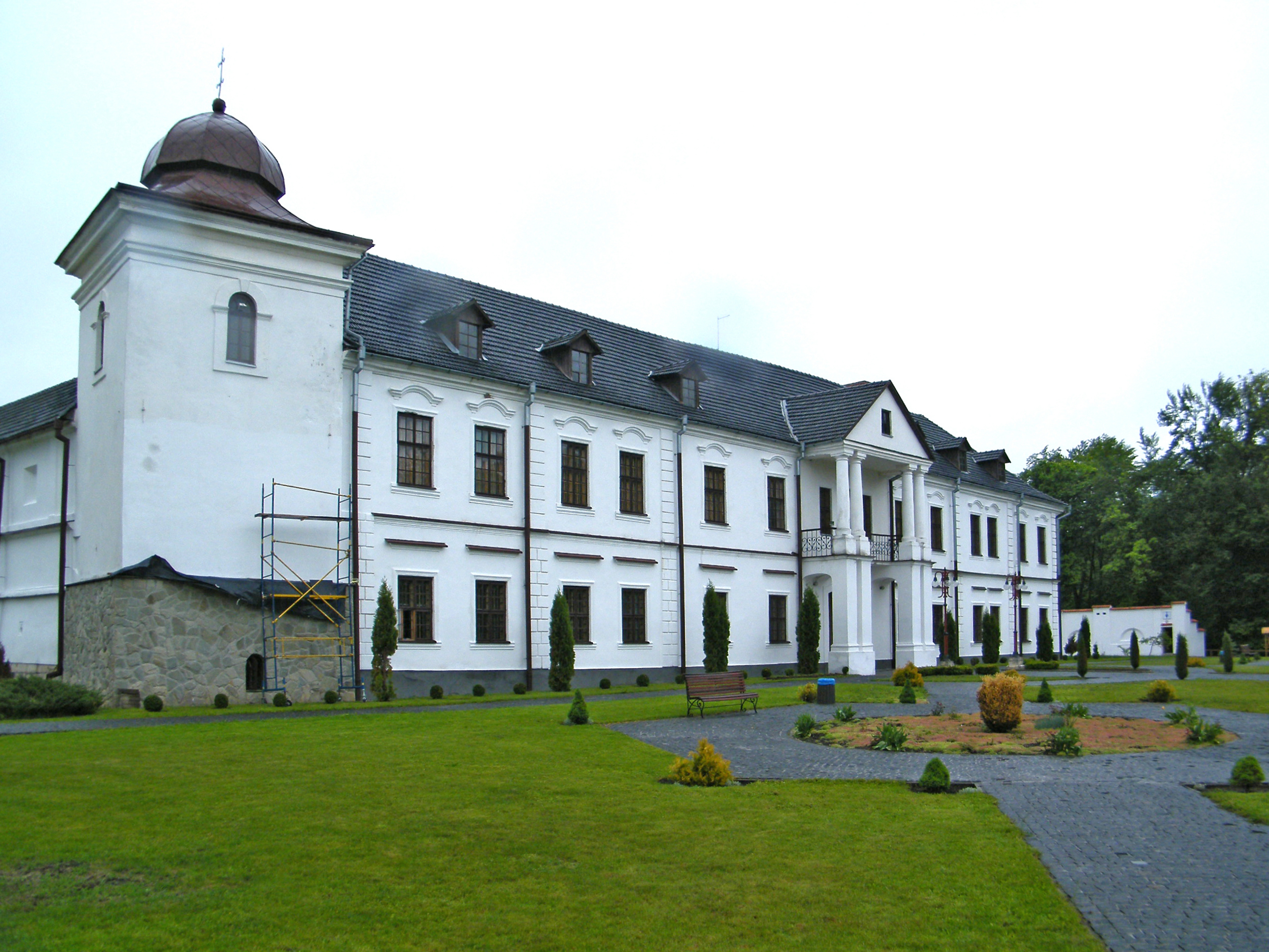 Фрагмент сооружения лавры